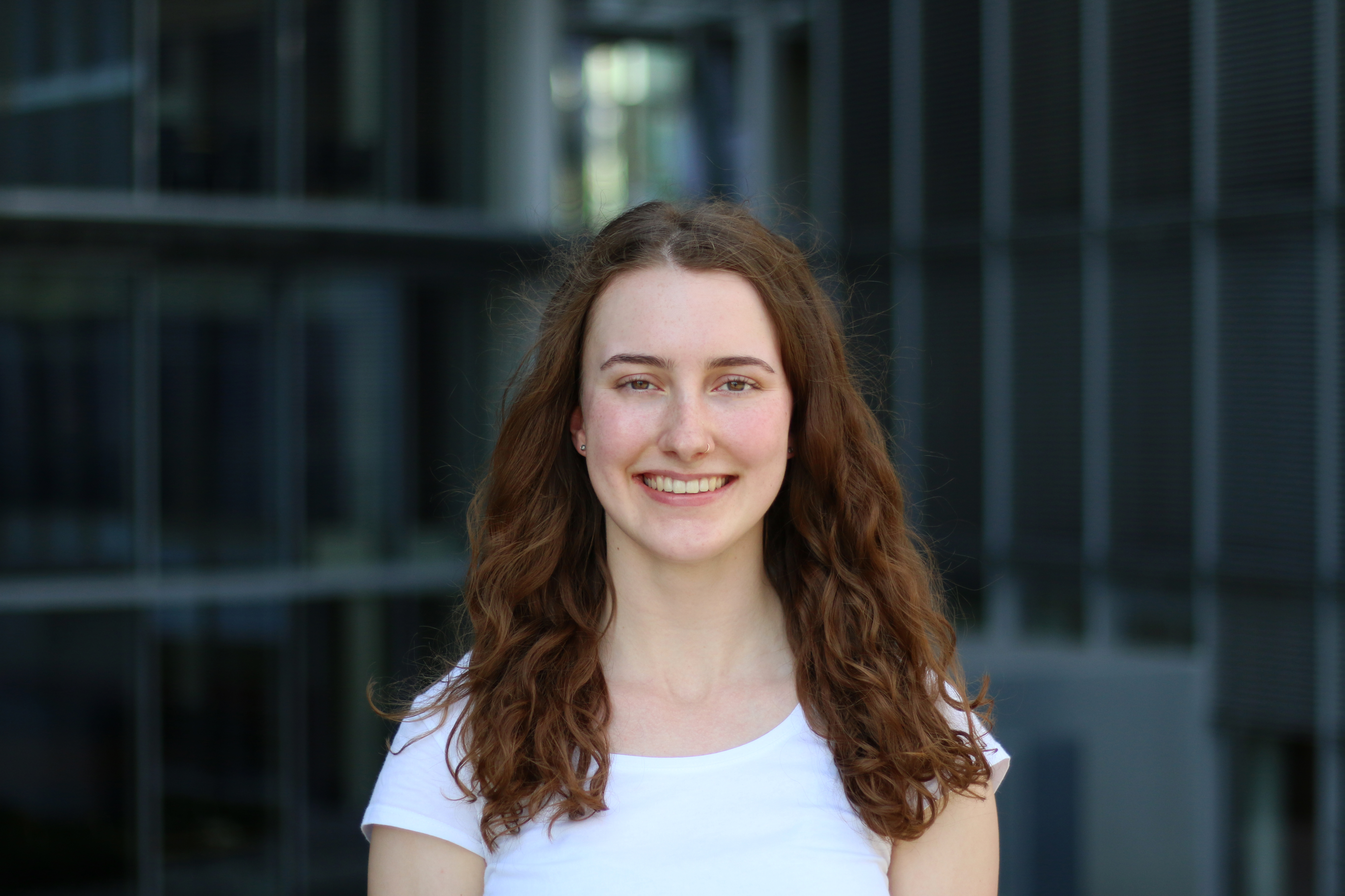 Anna Westner, 2019